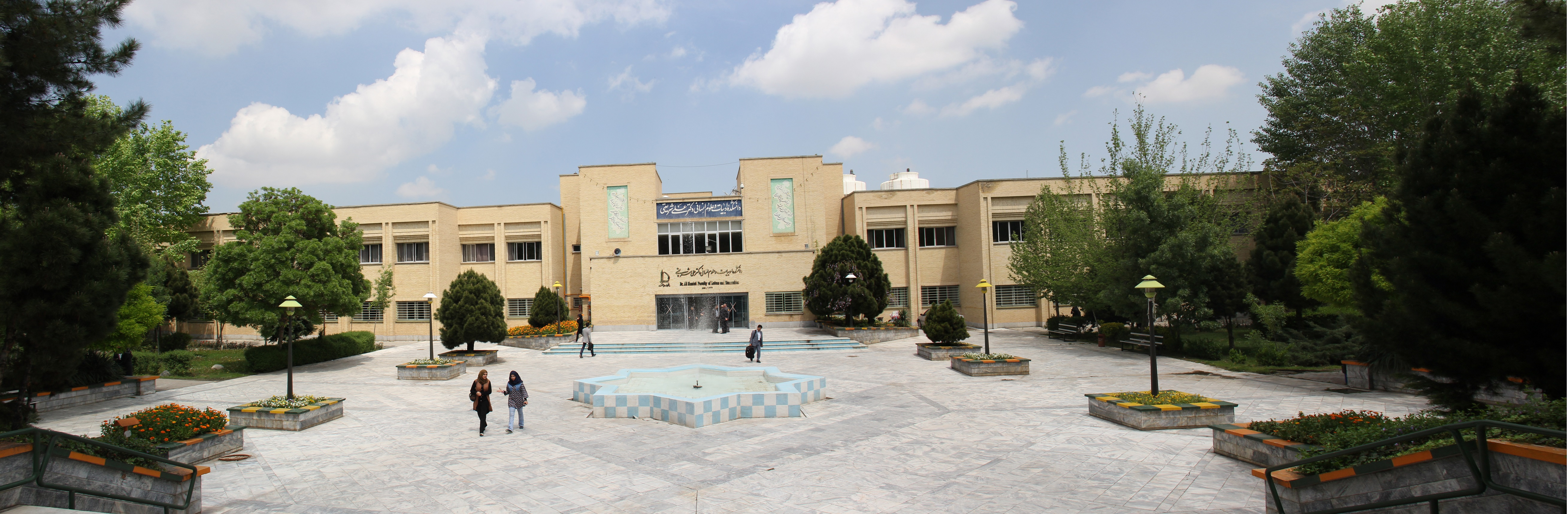 تصویر پانورامایی از ساختمان دانشکده ادبیات و علوم انسانی دکتر علی شریعتی واقع در پردیس اصلی دانشگاه فردوسی مشهد